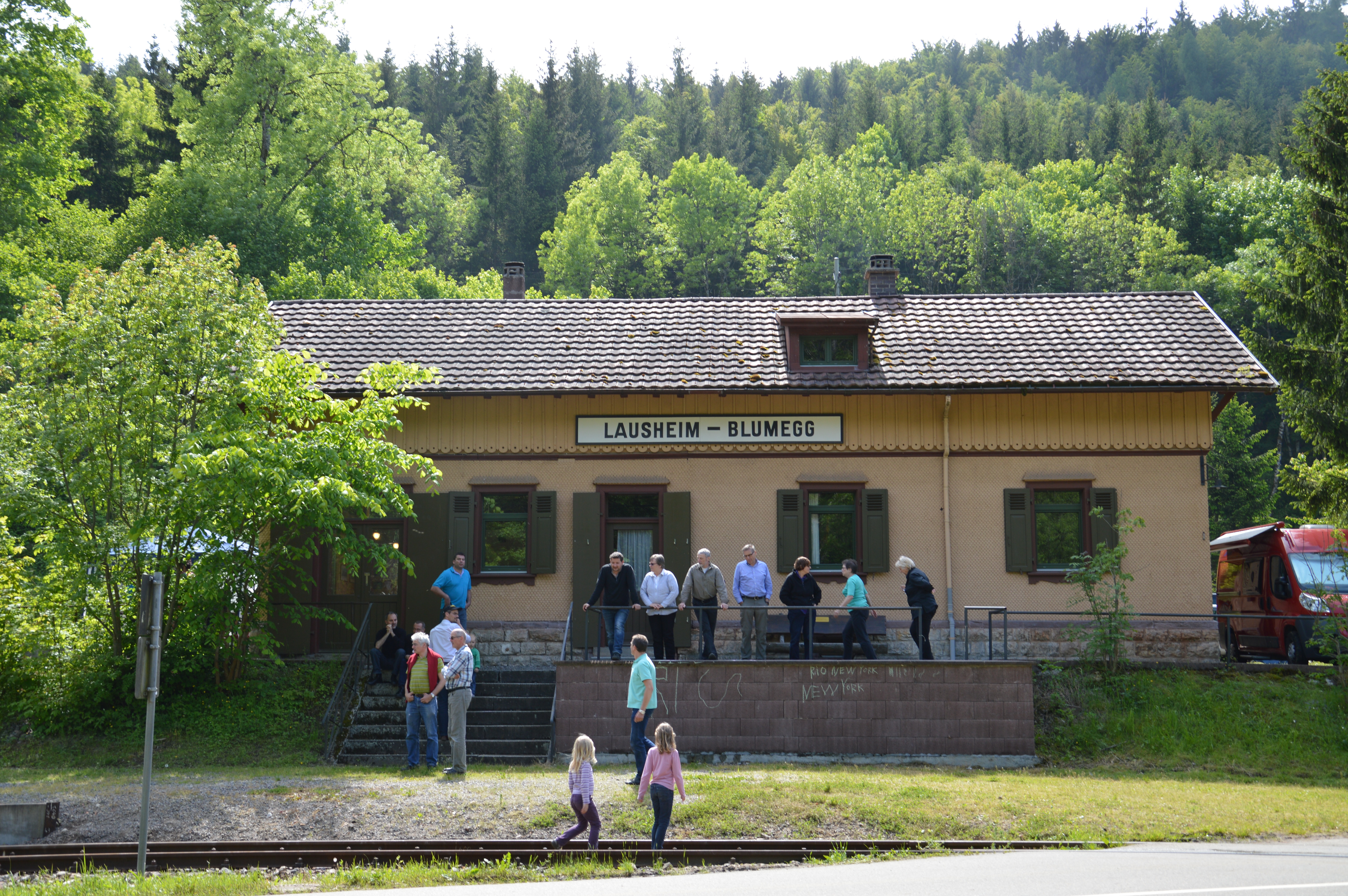 EG vom Haltepunkt Luusè-Blumegg.